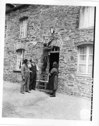 Libération